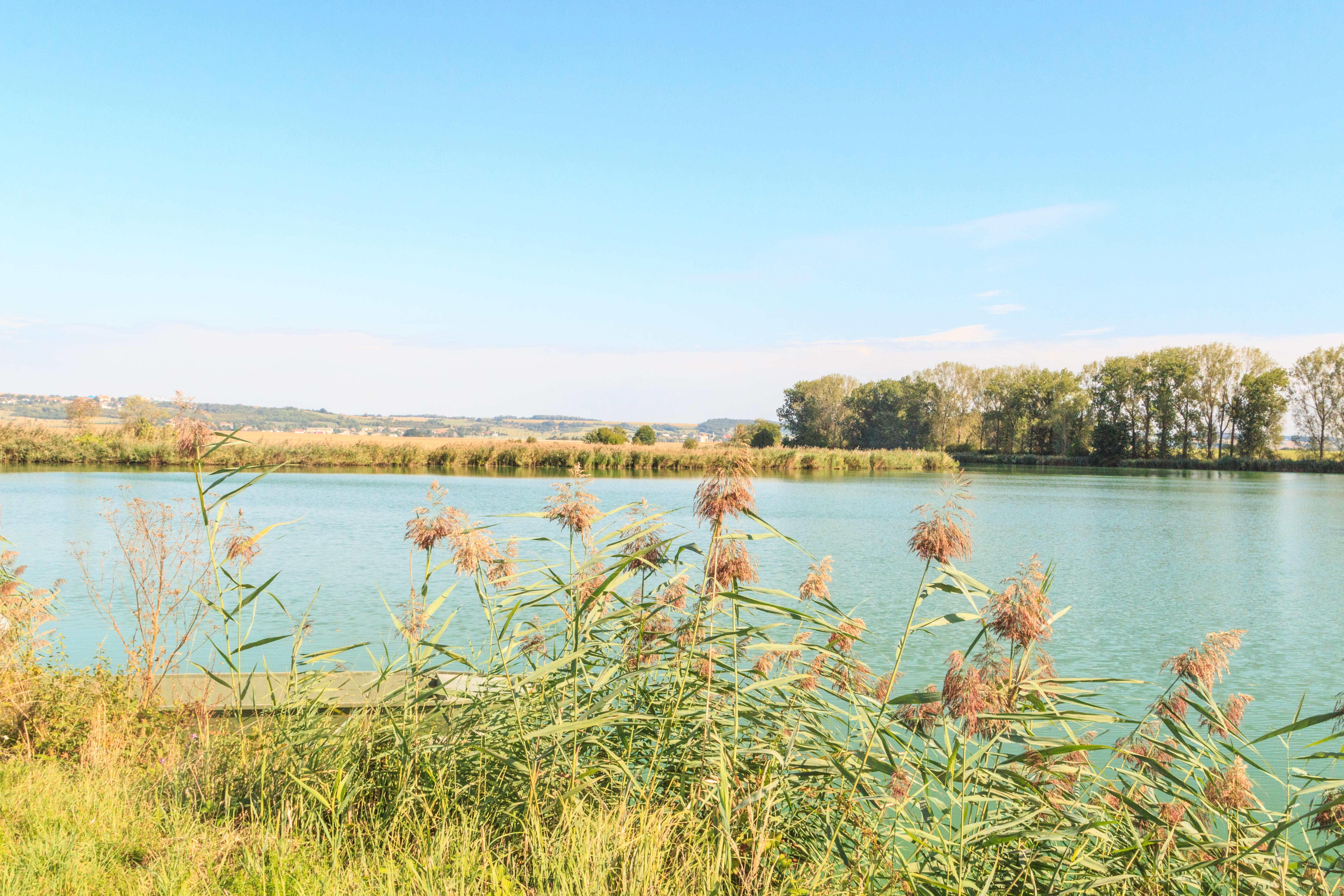 rybník Mrštín u Kosořic